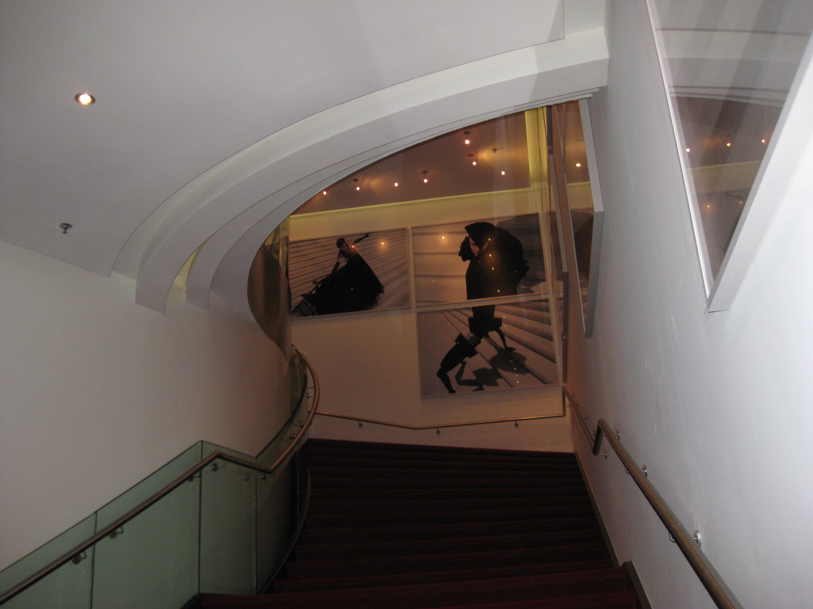 Interieur DeLaMar theater, Marnixstraat in Amsterdam